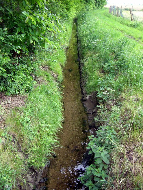 Die Niers in Kuckum kurz hinter der Quelle. Blick in Richtung Quelle.